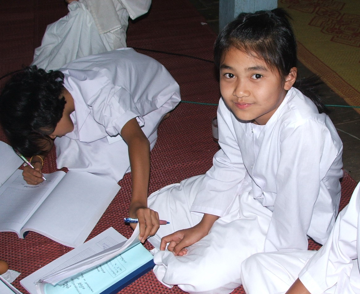 ผู้ถืออุโบสถศีลในศาสนาพุทธ จะสวมชุดสีขาวตามธรรมเนียมประเพณี แสดงออกถึงการชำระใจให้บริสุทธิ์ religious student woman in the Buddhism. Thailand, Uttaradit, 2006. Own work